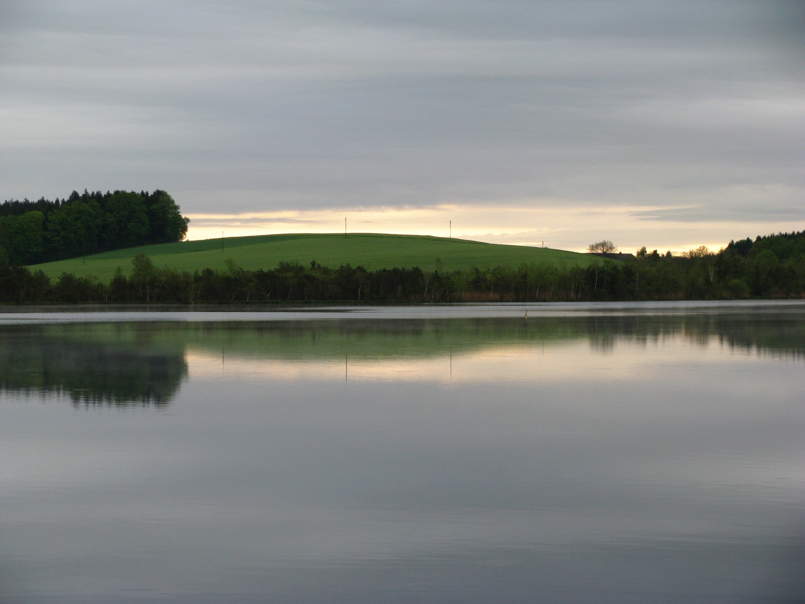 Hofstätter See; Blick nach Nordosten